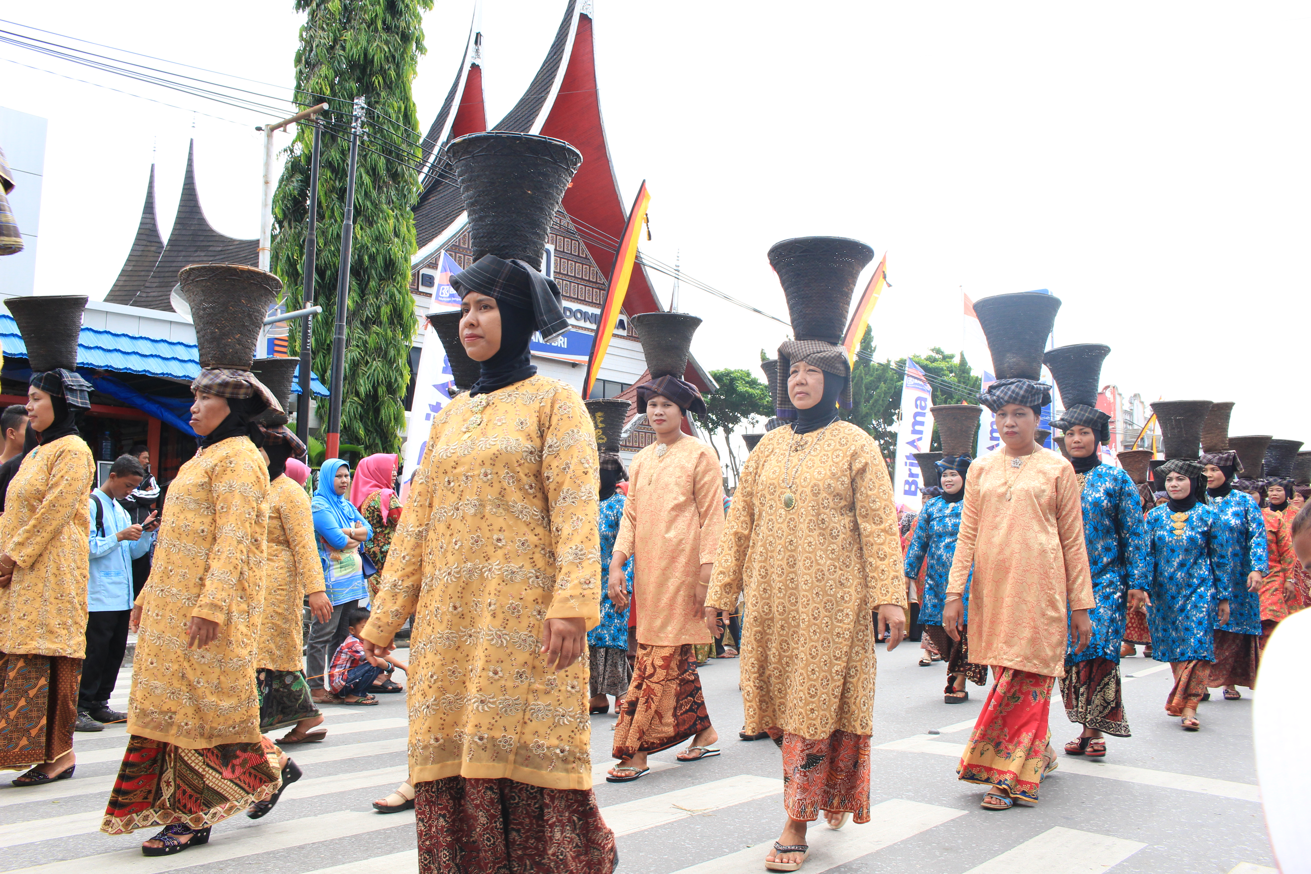 Baju Kurung atau baju kuruang basiba merupakan pakaian kaum perempuan Minangkabau yang sudah dikenal identitasnya dan menjadi identitas perempuan Minang. Baju kuruang iniadalah pakaian Bundo Kanduang sebagai Limpapeh Rumah Nan Gadang, keistimewaan bajukuruang basiba adalah longgar dipakai, sehingga tidak membentuk lekuk tubuh.